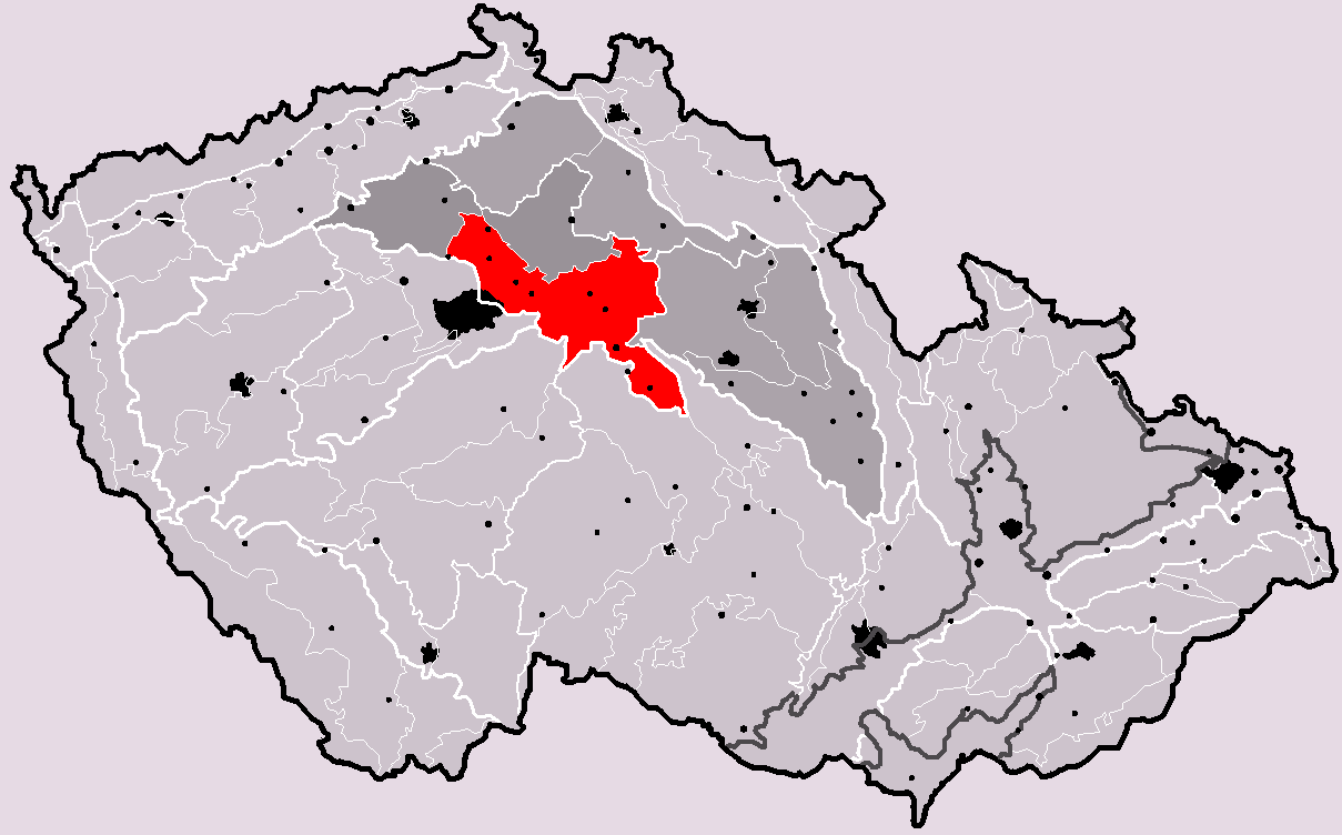 Poloha geomorfologického celku Středolabská tabule v rámci České republiky. Hercynský systém Hercynská pohoří I Česká vysočina I6 (VI) Česká tabule I6B (VIB) Středočeská tabule I6B-3 (VIB-3) Středolabská tabule